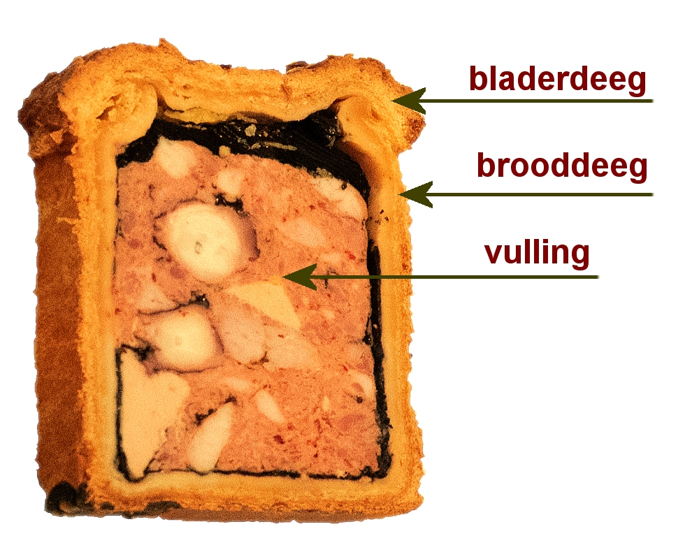 Paté en croute